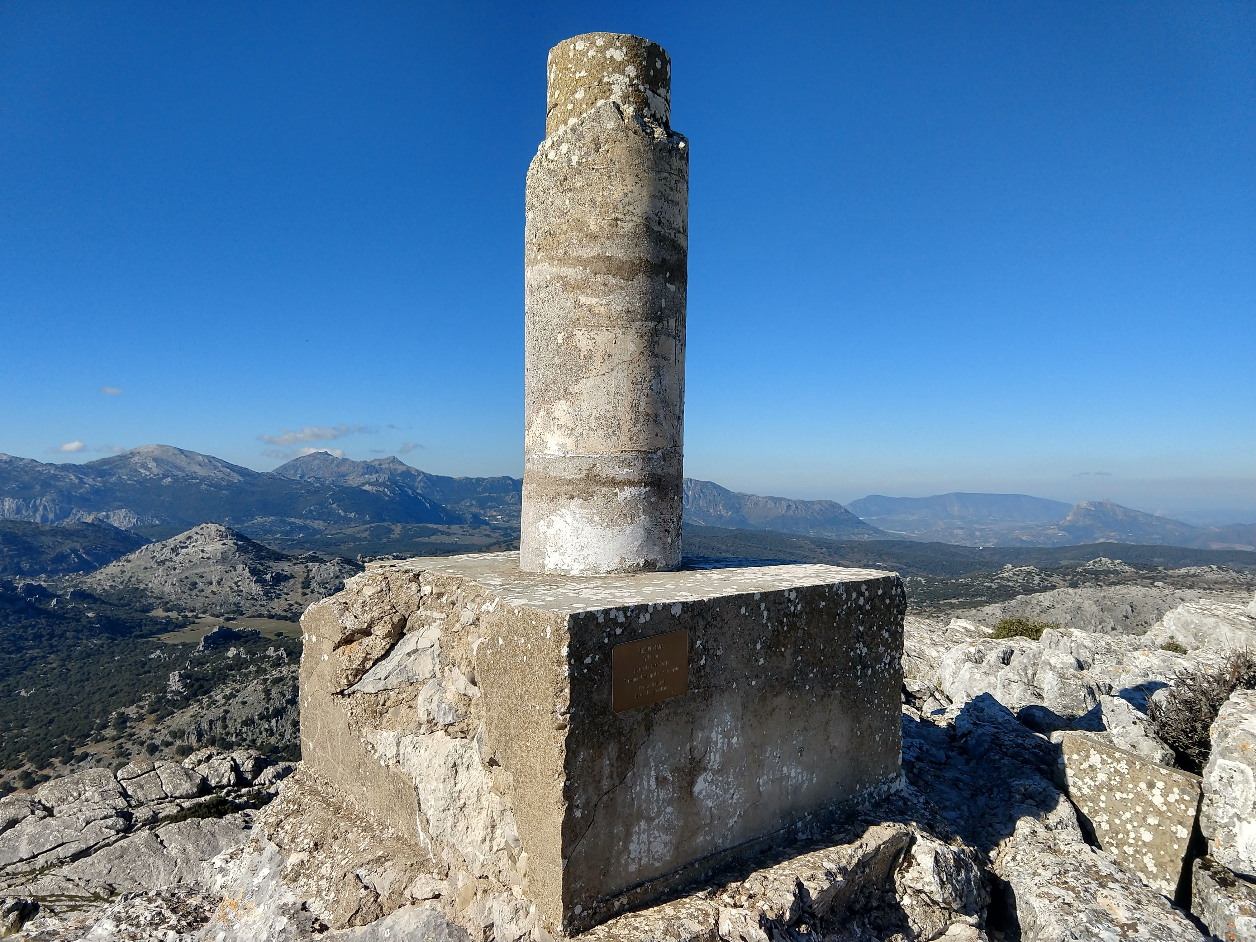 Imagen en primer plano del Vértice geodésico del Pico Ventana, en Enero de 2020.